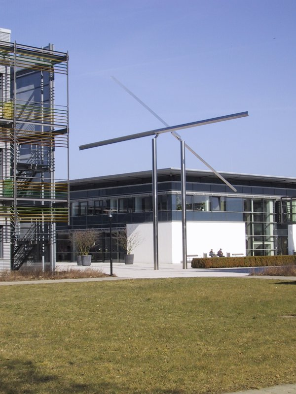 MPI für Gravitationsphysik in Golm bei Potsdam/Germany